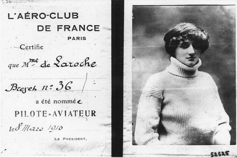 רישיון הטייס הראשון בעולם שהונפק לאישה. בתמונת הרישיון מופיעה הטייסת הצרפתייה ריימונד דה לרוש